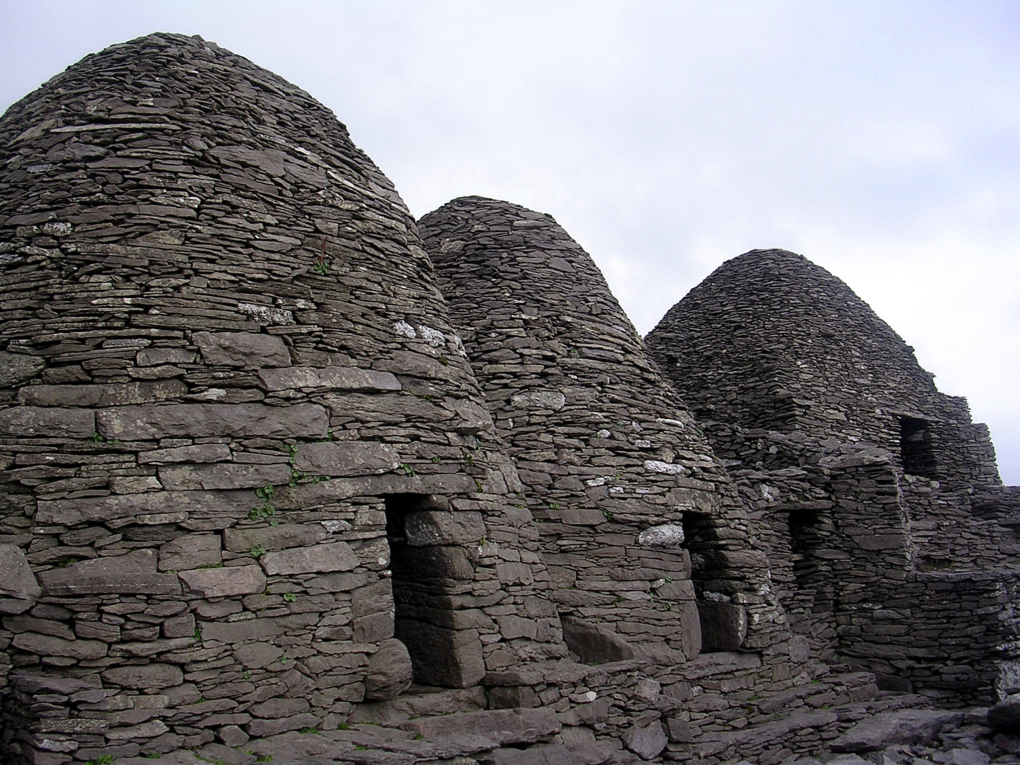 Skellig Michael behive huts